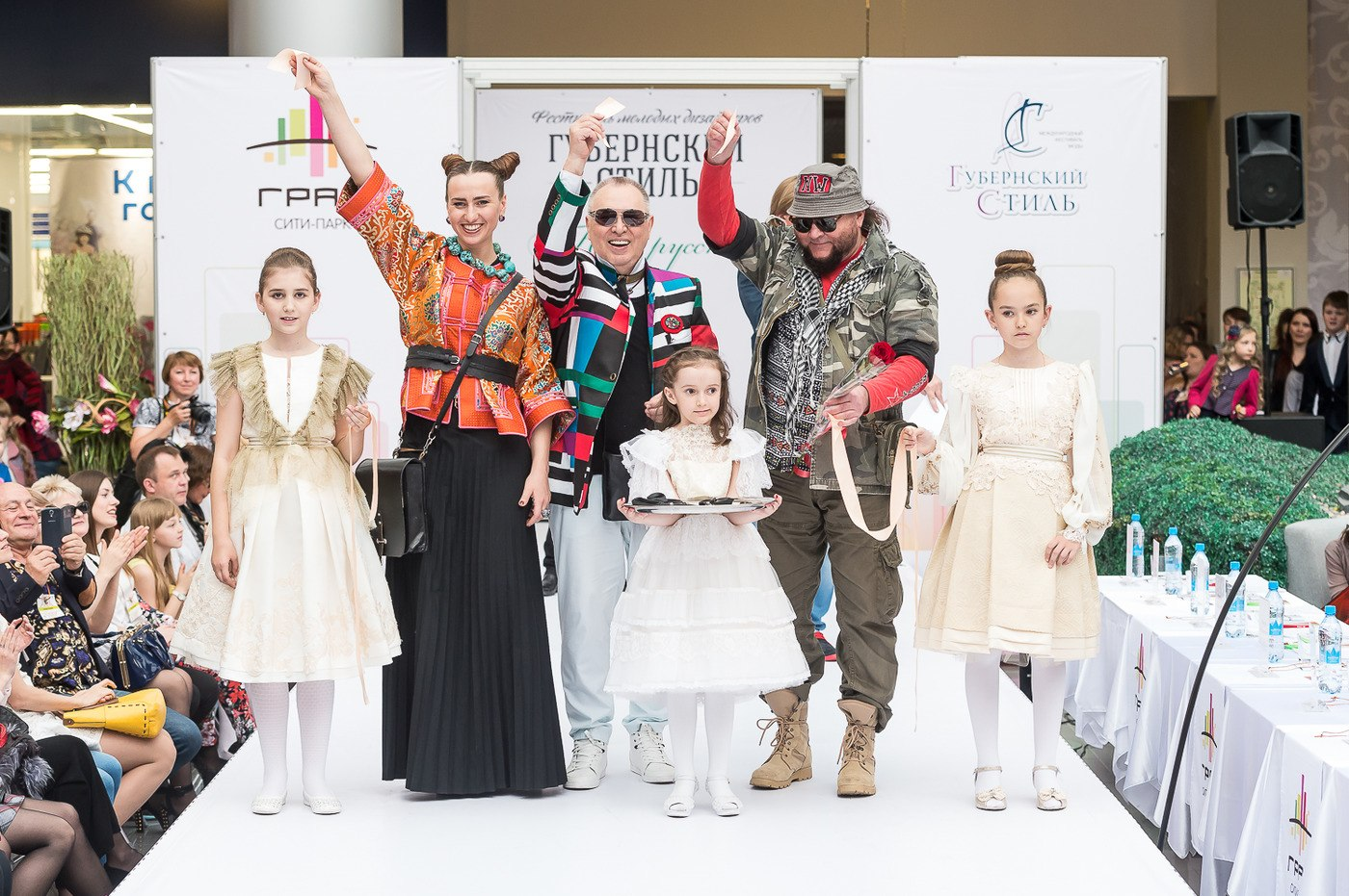 Ekaterina Rebezha, Vyacheslav Zaitsev, Yegor Zaitsev on Gubernskiy Style - 2015